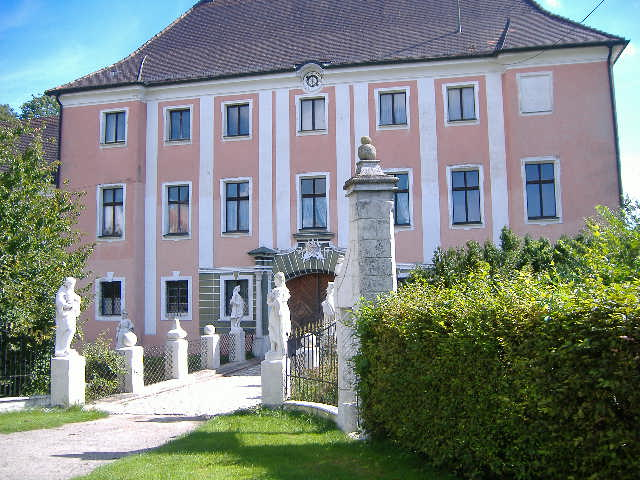 Schloss Sinning mit Hauptportal